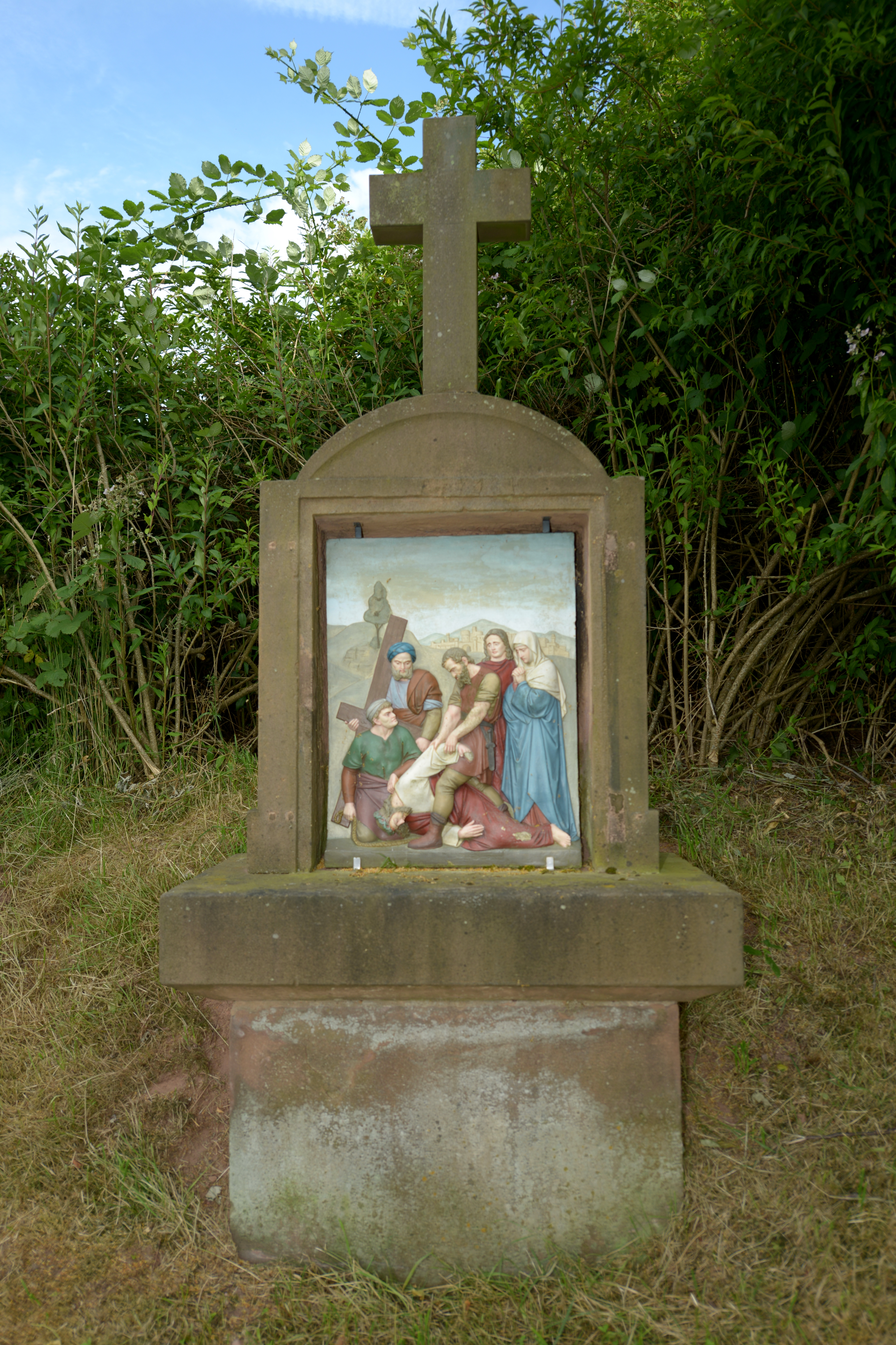 Vierter Schmerz: Maria begegnet ihrem kreuztragenden Sohn. Kreuzwegstation Gymnasialstraße, Illingen, Saarland, 2016